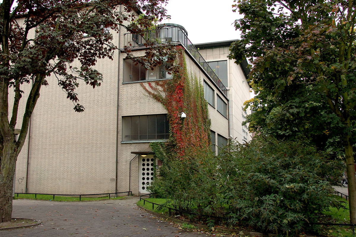 Zijaanzicht Synagoge Lekstraat